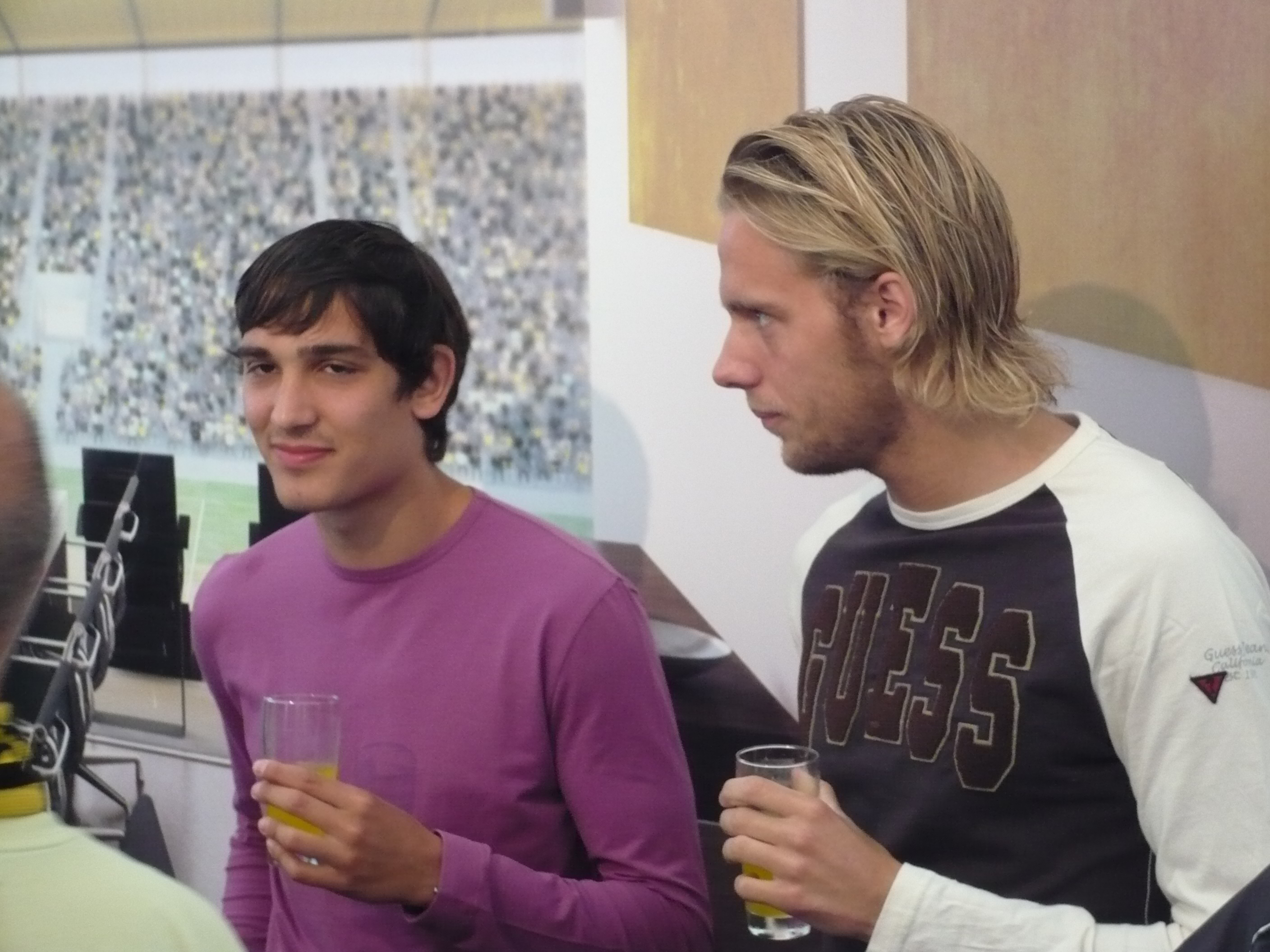 Daniel Brinkmann (re.) und Jérôme Polenz am 17. Mai 2008 in Aachen